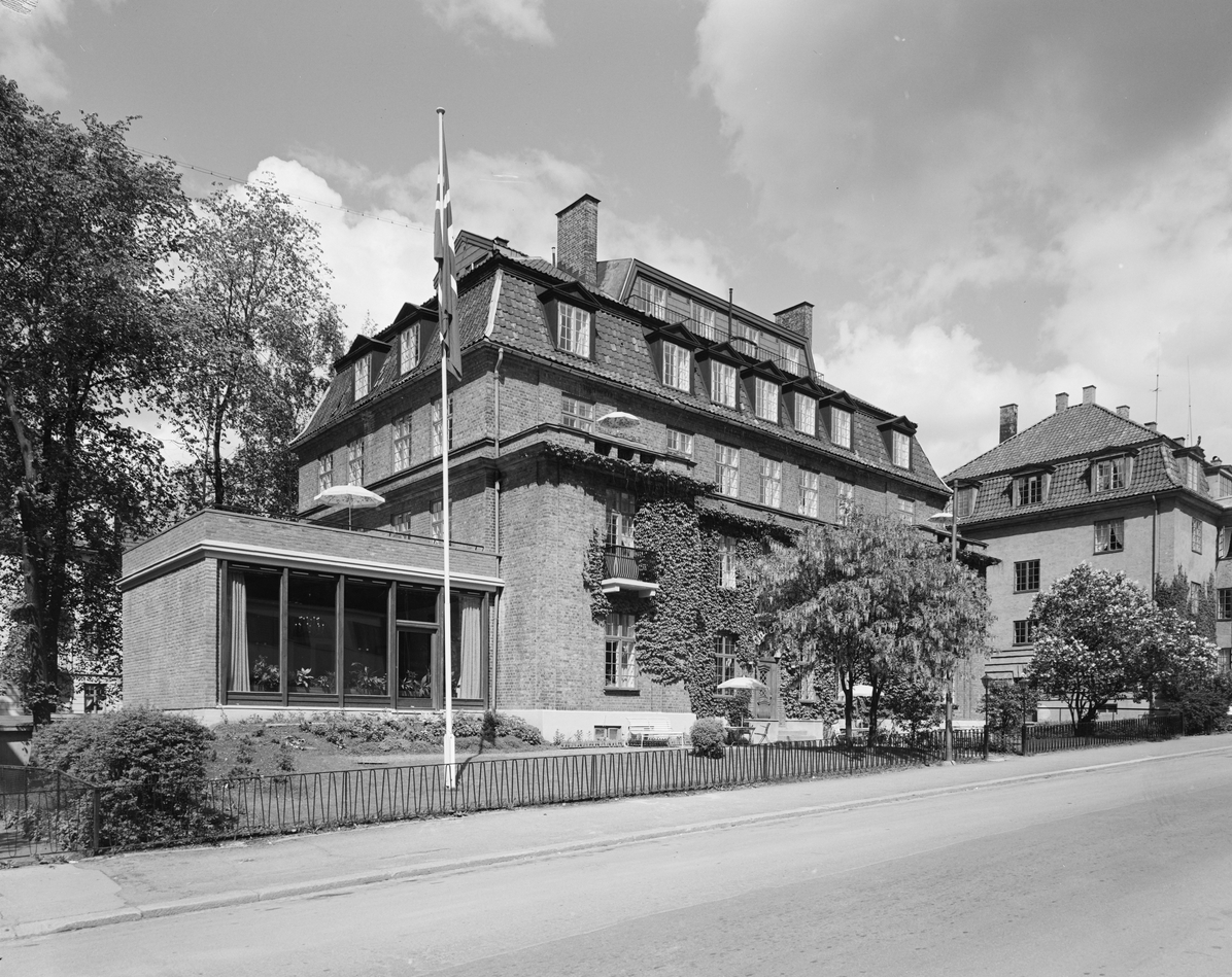 Hotell Gabelshus i Gabels gate 16. Foto: Leif Ørnelund, 1967. Fra Byhistorisk samling hos Oslo museum.